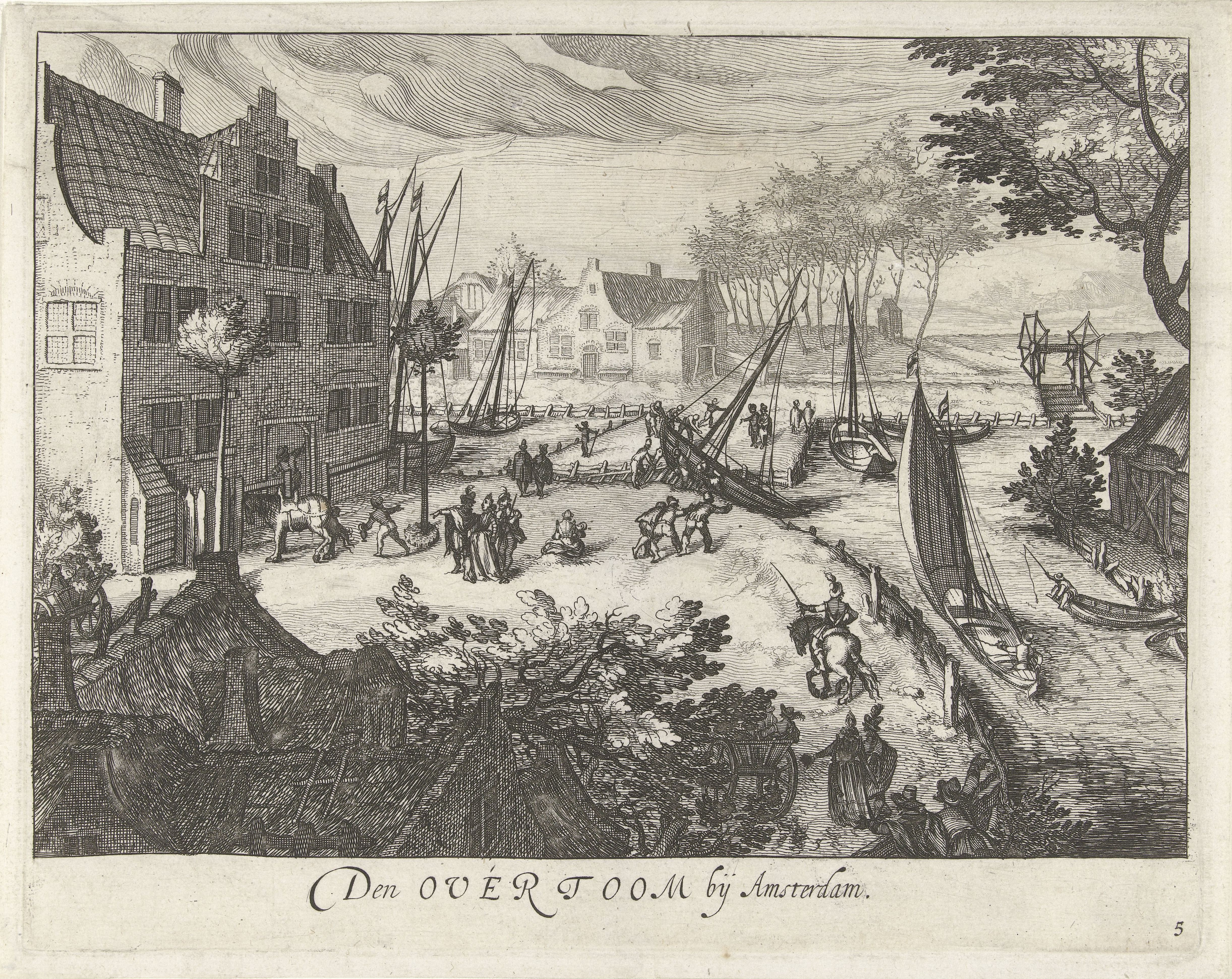 Overtoom te Amsterdam (titel op object). Gezicht op Amsterdam (serietitel) 5/5